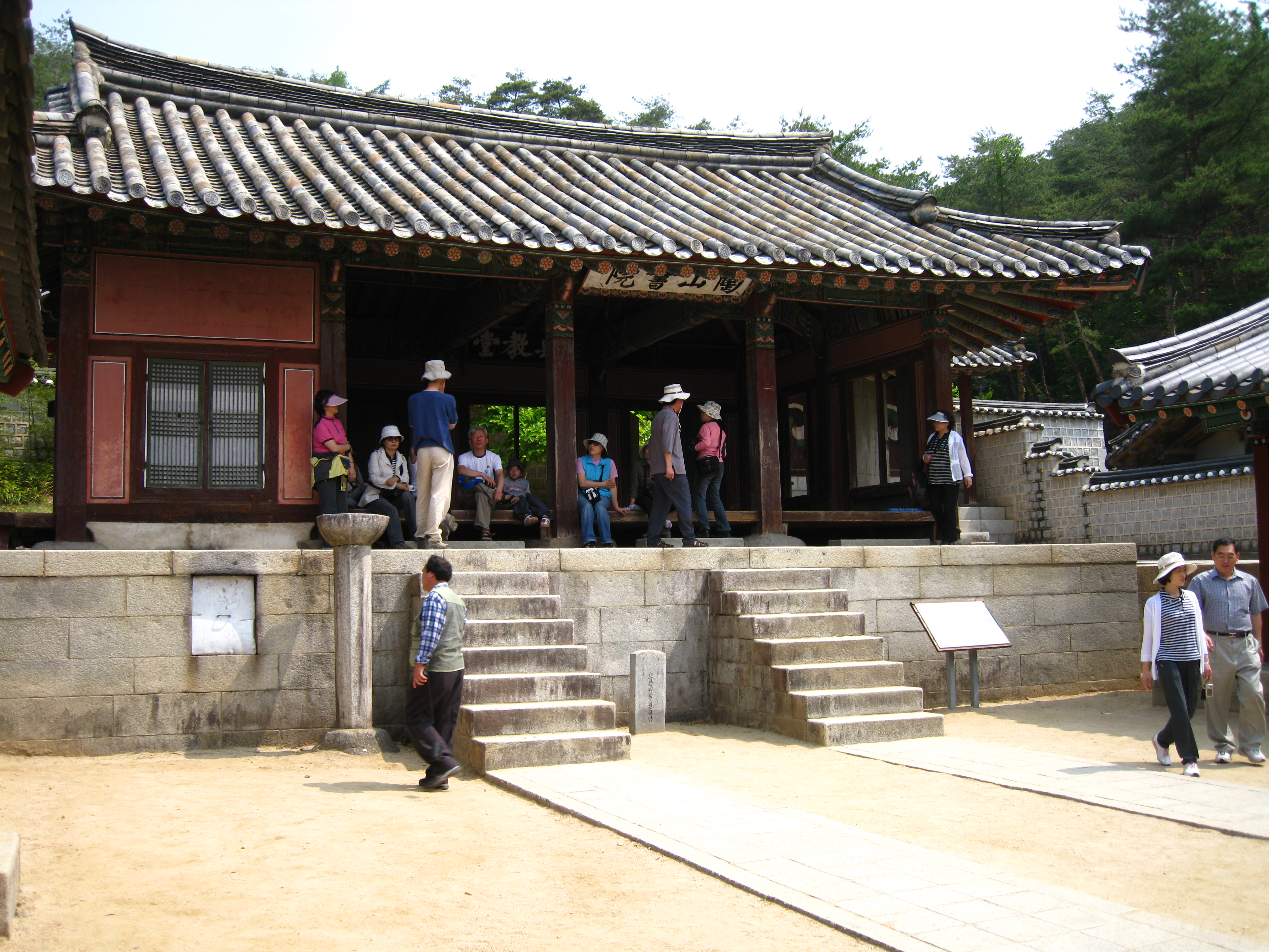 Jeongyodang (전교당) in Dosan Seowon, Andong, South Korea